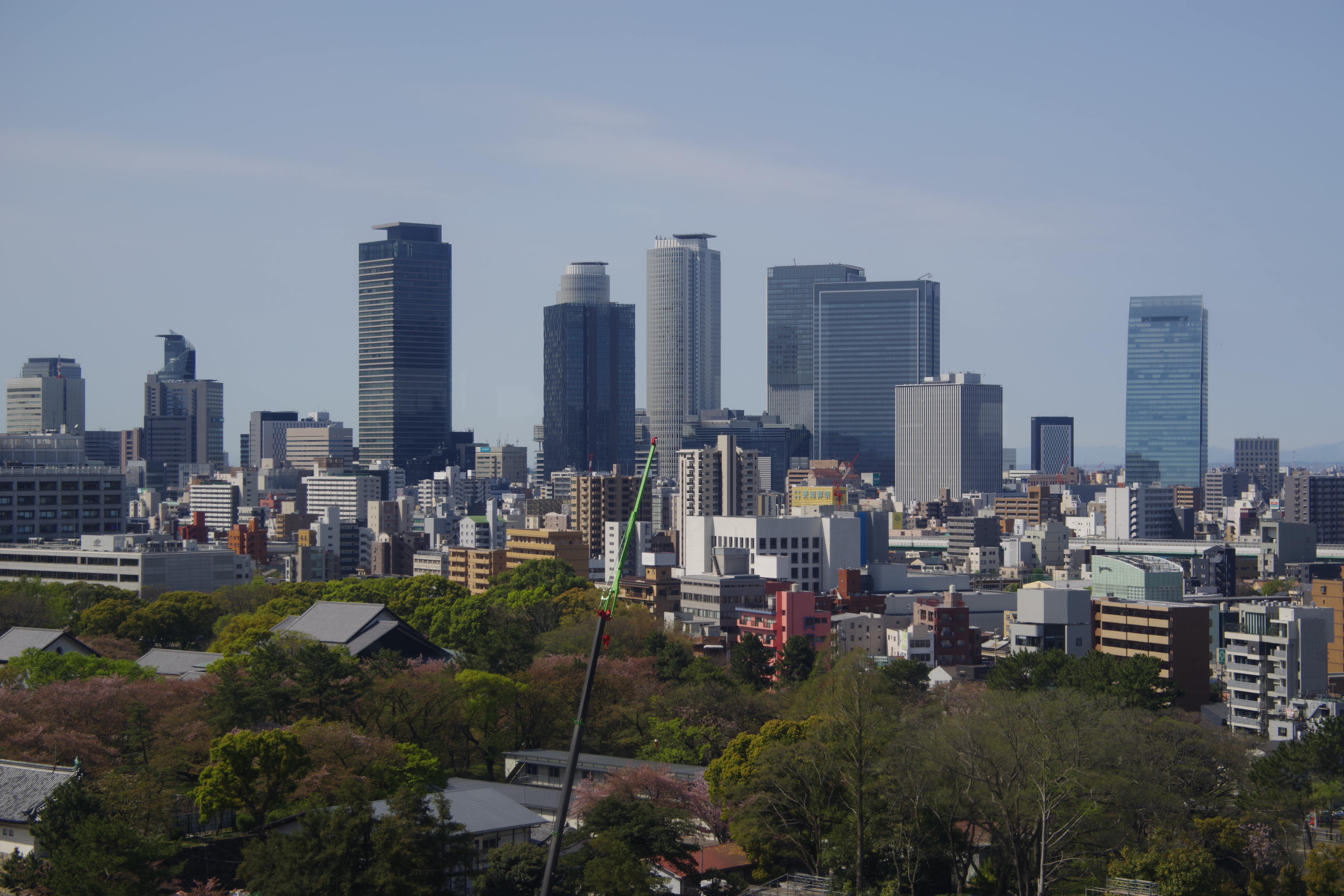 SRC造名古屋城大天守7階。円偏光フィルター使用